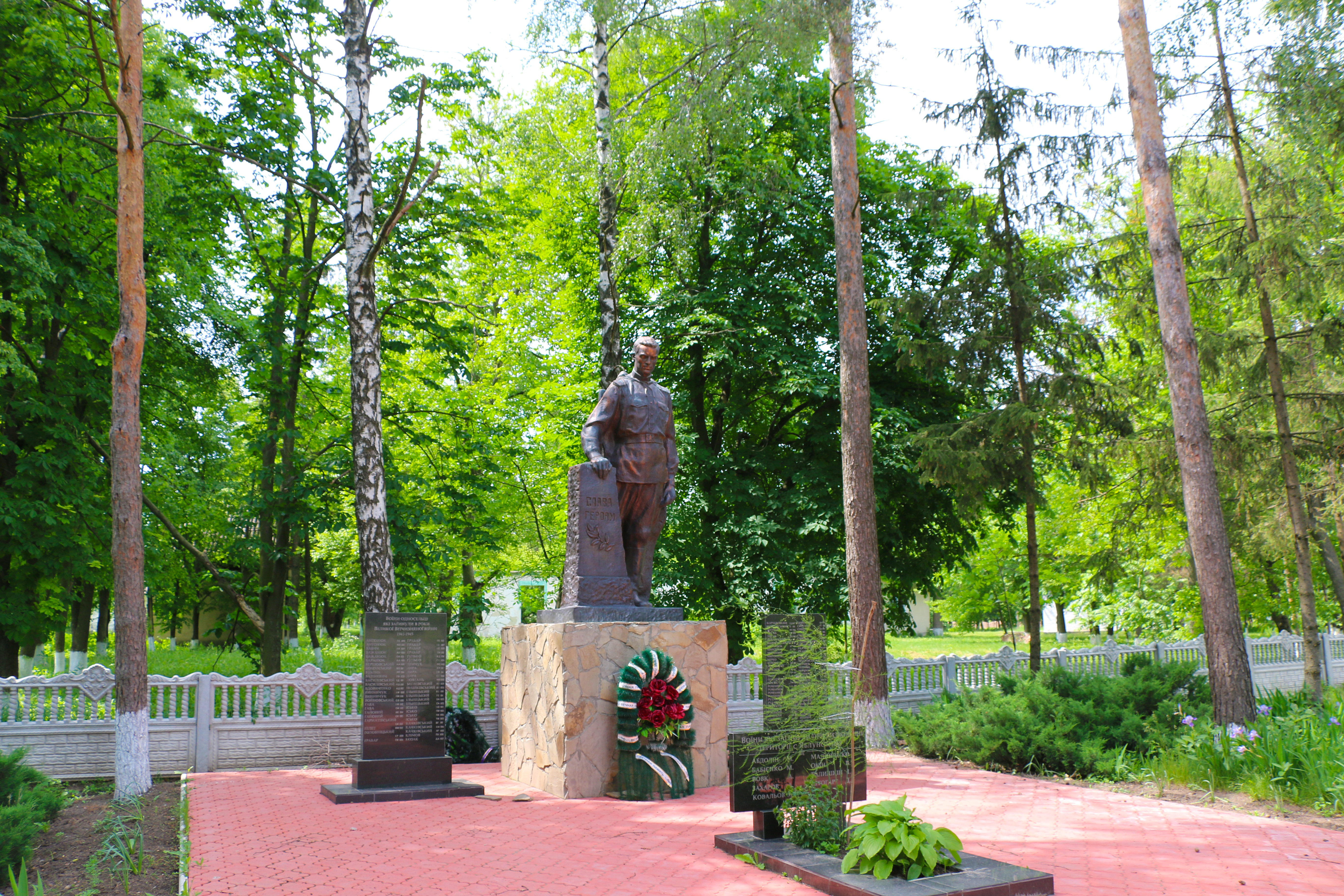 Братська могила 13 воїнів Радянської Армії, загиблих при звільненні села, і пам'ятник 58 воїнам-односельчанам,загиблим на фронтах Великої Вітчизняної війни, Яблуновиця, біля Будинку культури